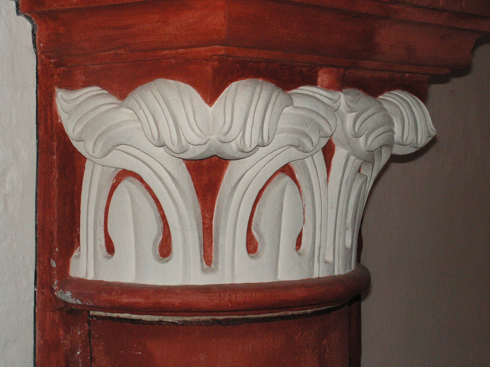 Kapitell einer Gewölbesäule in der St.-Nikolai-Kirche (ehem. Zisterzienserinnenkloster) Caldern